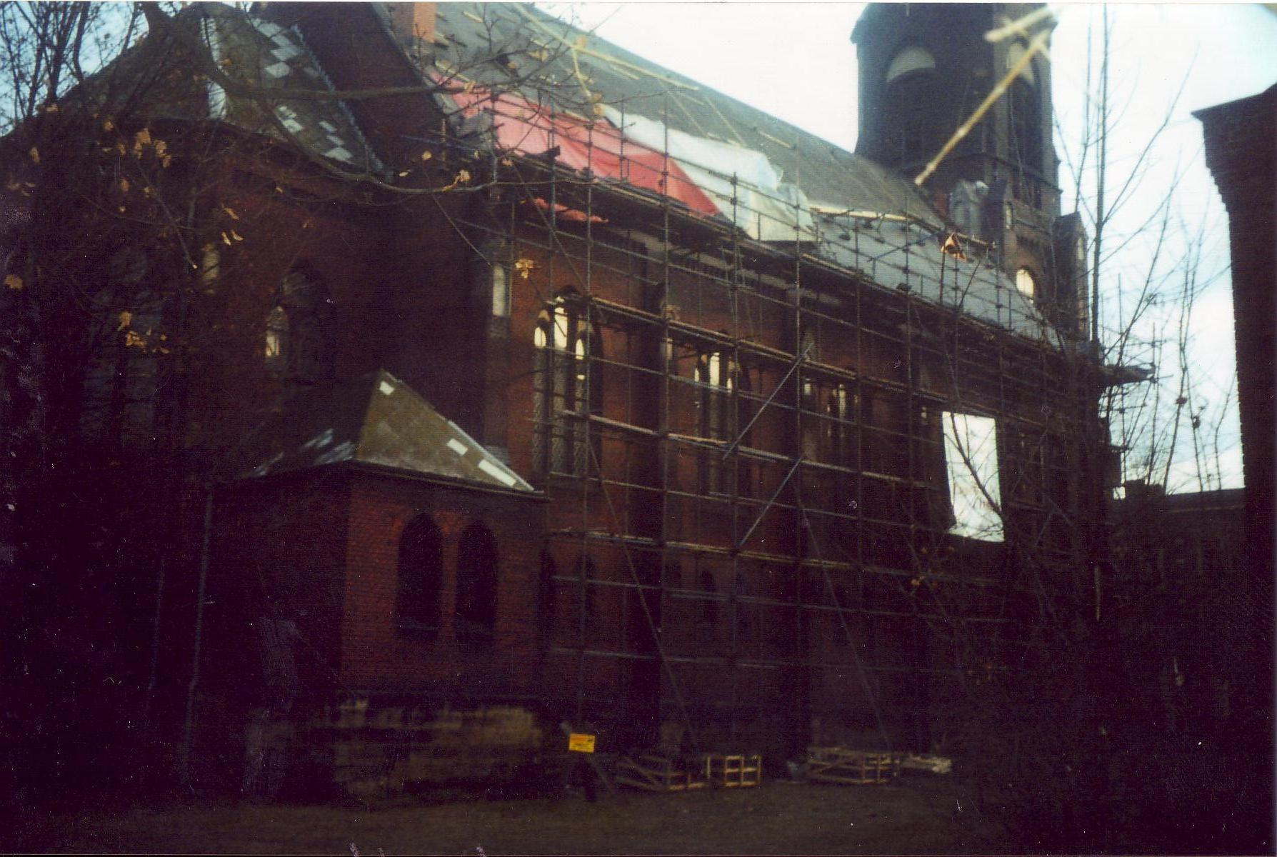 Kościół Zbawiciela w Szopiniecach - naprawa dachu.